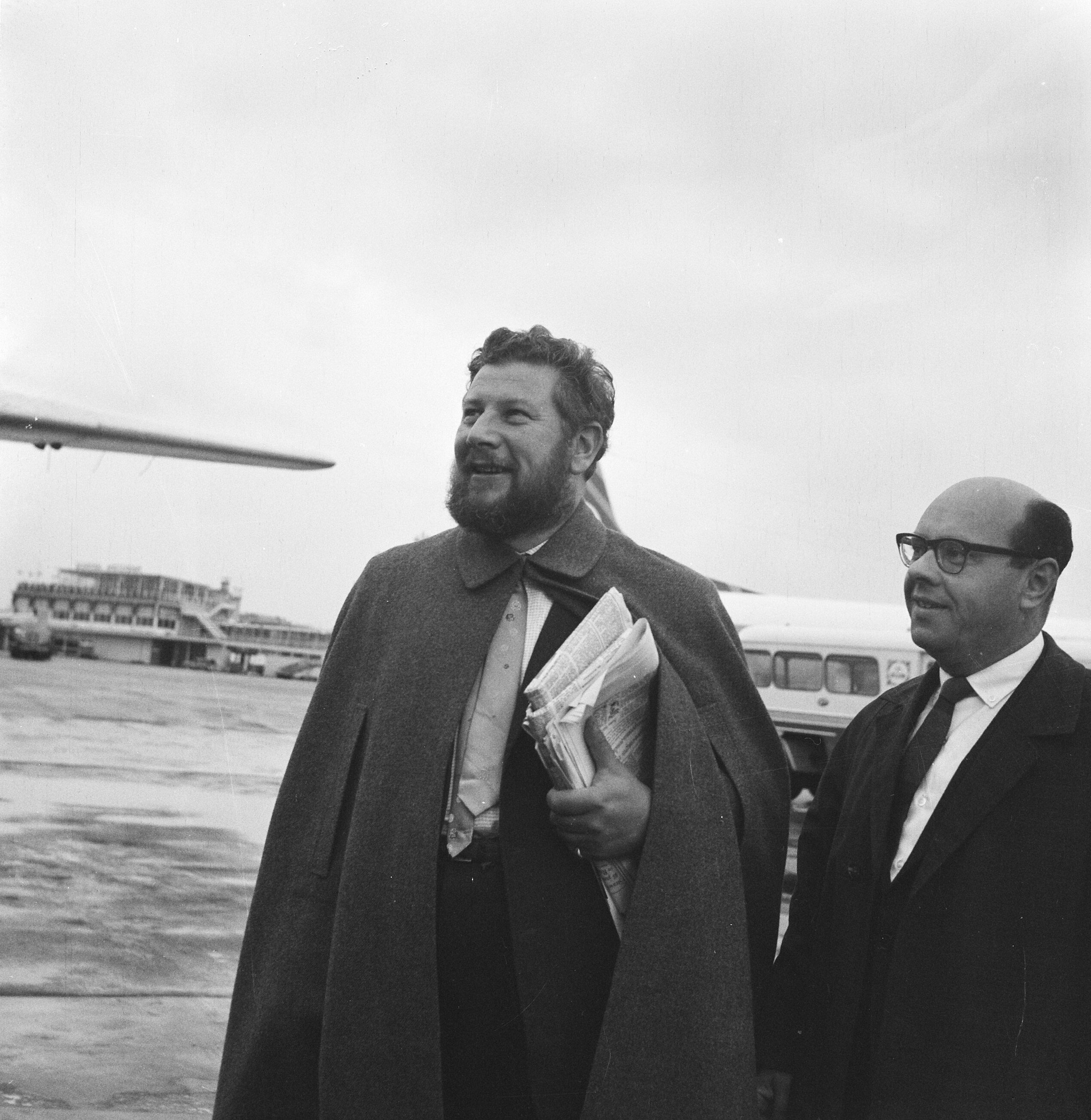 Collectie / Archief : Fotocollectie Anefo Reportage / Serie : [ onbekend ] Beschrijving : Peter Ustinov , Engelse filmregisseur [naast hem Simon van Collem] Annotatie : Peter Ustinov was in ons land voor een interview met Simon van Collem voor zijn televisieprogramma 'Draaidoos'.. Dit interview werd pas uitgezonden door de VPRO televisie op 5 januari 1963 Datum : 24 september 1962 Locatie : Schiphol Trefwoorden : filmregisseurs Persoonsnaam : Collem, Simon van, Ustinov, Peter Fotograaf : Nijs, Jac. de / Anefo Auteursrechthebbende : Nationaal Archief Materiaalsoort : Negatief (zwart/wit) Nummer archiefinventaris : bekijk toegang 2.24.01.03 Bestanddeelnummer : 914-3399 Reacties Geplaatst door Maaike op 14 mei 2014 - 11:18. Peter Ustinov was in ons land voor een interview met Simon van Collem voor zijn televisieprogramma 'Draaidoos'. Plaats: Schiphol, Noord-Holland Persoonsnamen: Simon van Collem NB. Dit interview werd pas uitgezonden door de VPRO televisie op 5 januari 1963